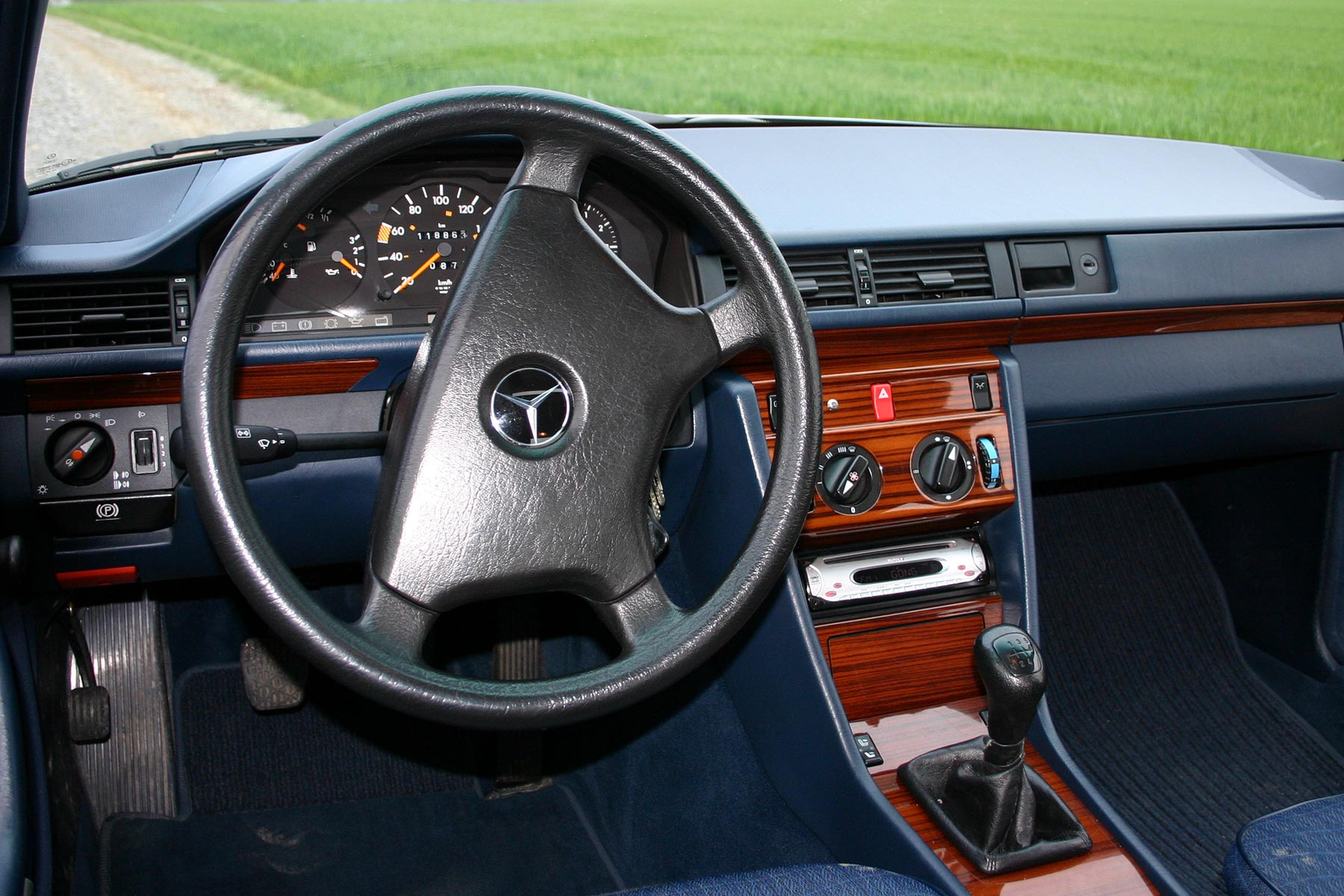 Cockpit des Mercedes PKW 200E W124. (Kamera: Canon EOS 300D)